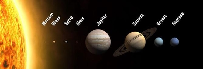 Système solaire simplifié. D'après